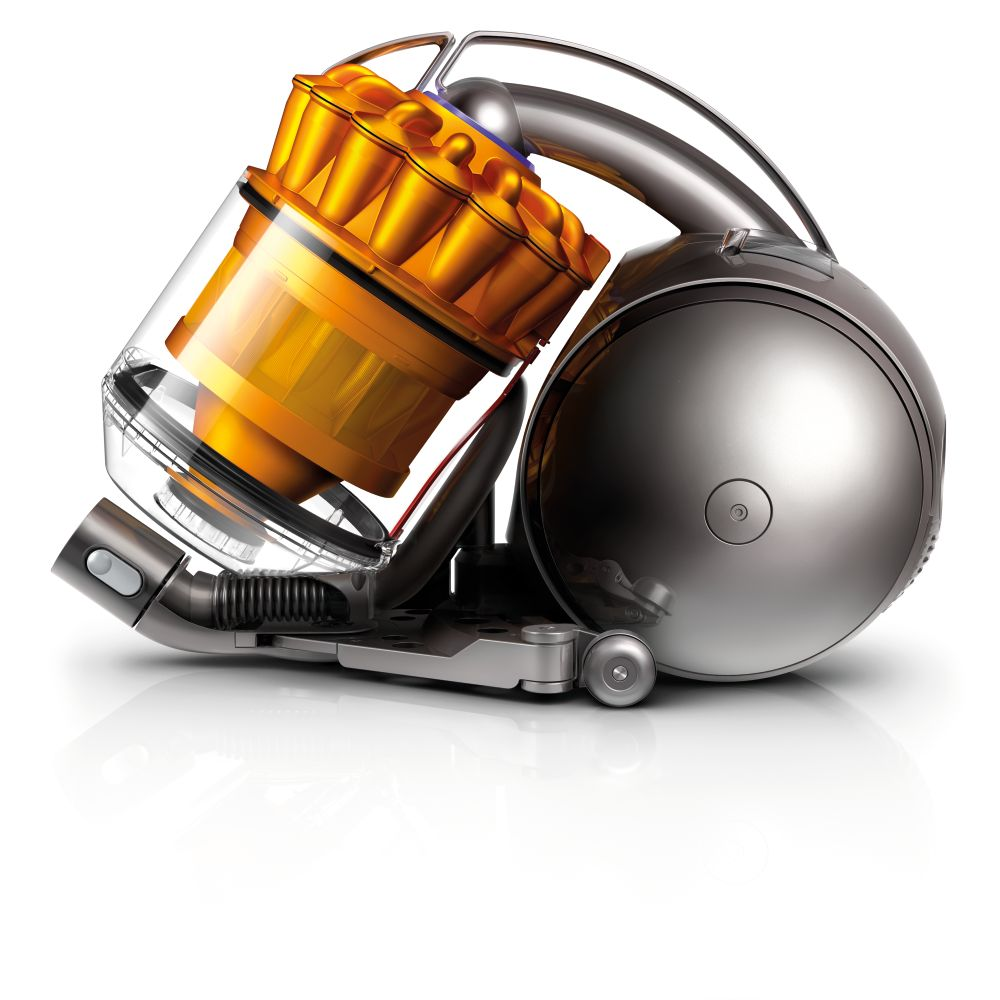 Пылесос_Dyson_DC37